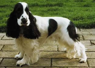 perros